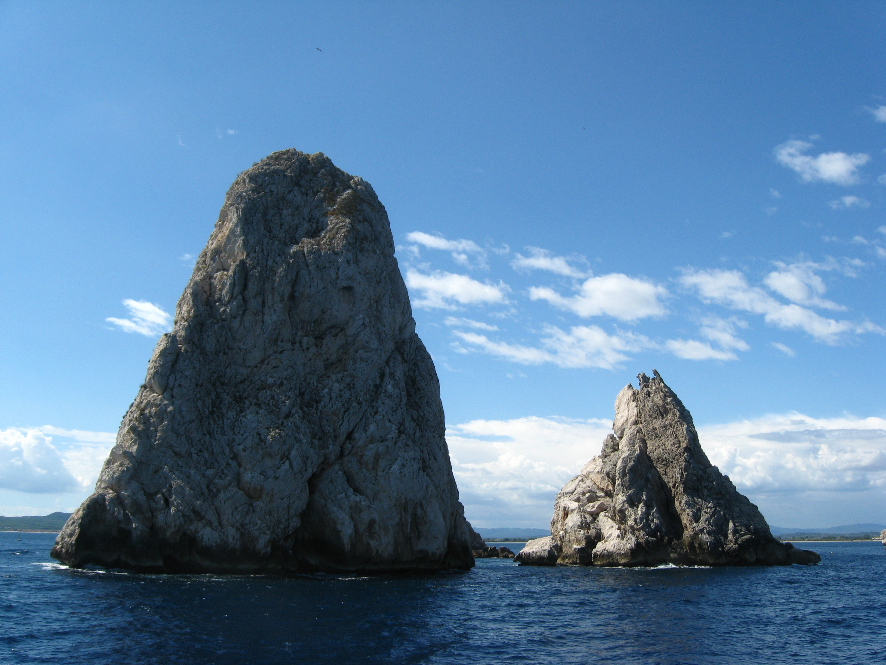 Medes-Insel bei L’Estartit Datum: 09.09.2010 Urheber: Michael Pfeiffer alias Benutzer:Gordito1869 Quelle: privates Fotoarchiv des Urhebers